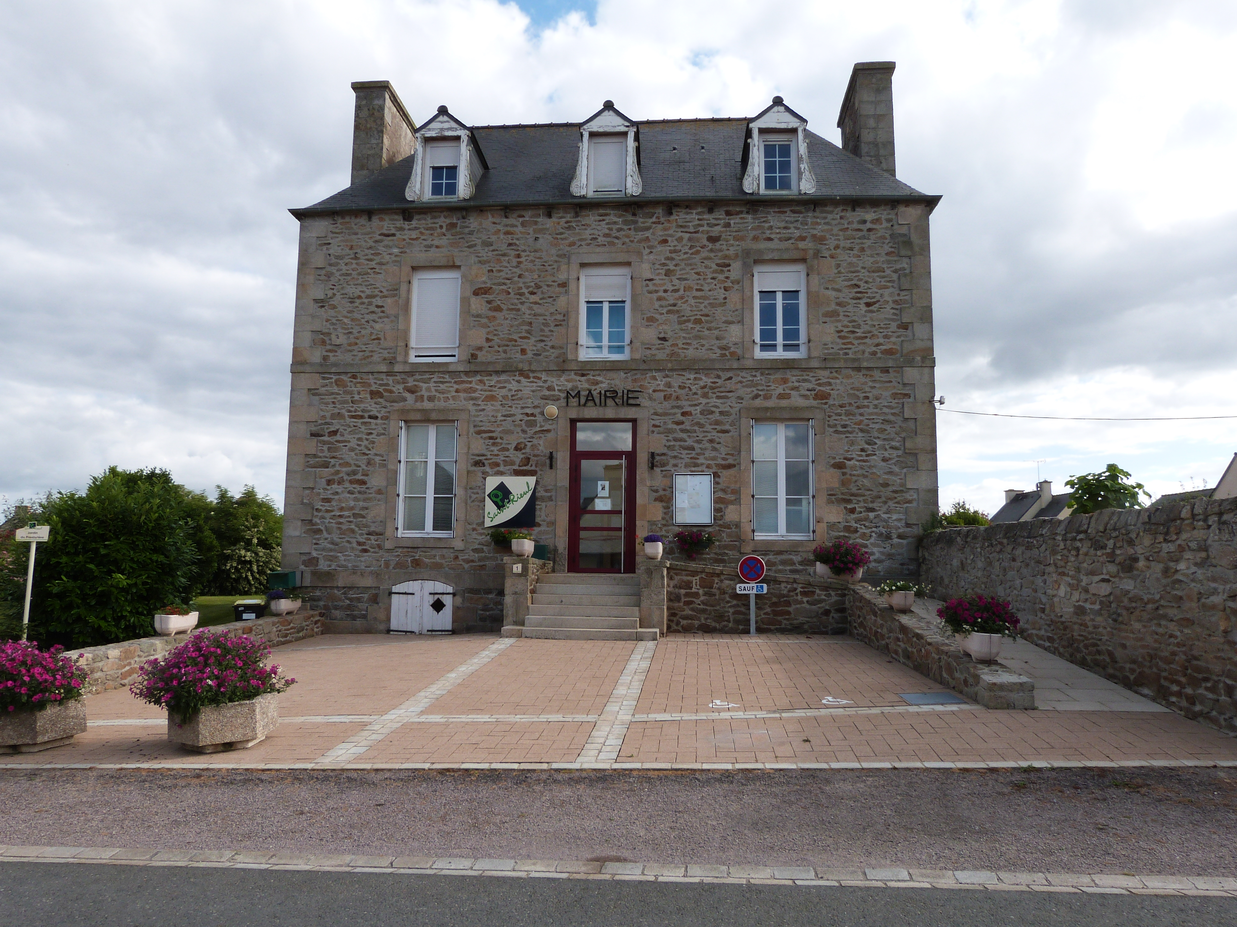 Mairie de Saint-Rieul